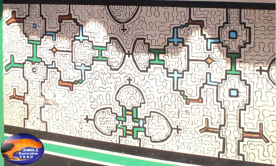 mural shipibo